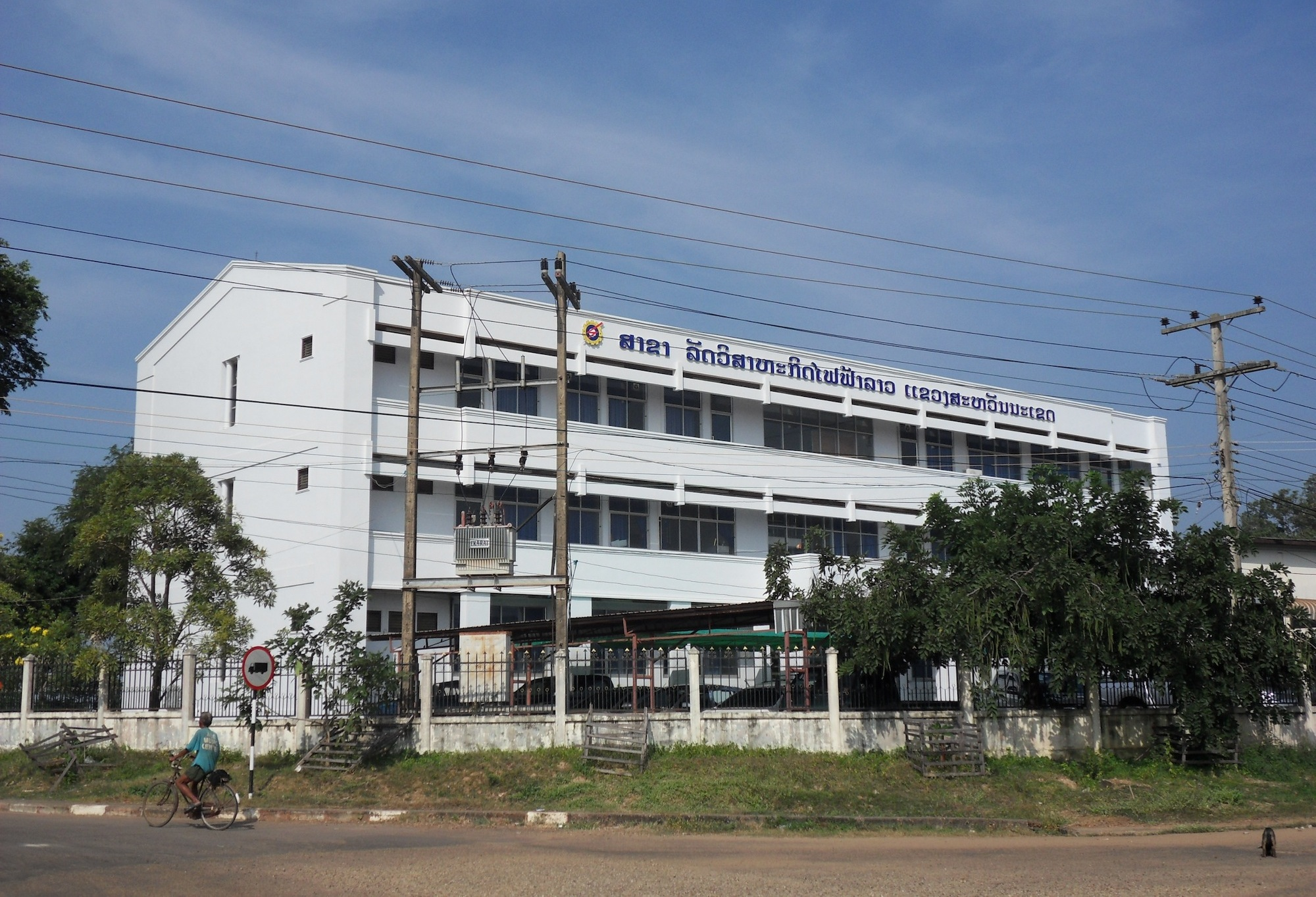 Siège local d'Electricité du Laos (EDL) à Savannakhet, nov. 2011